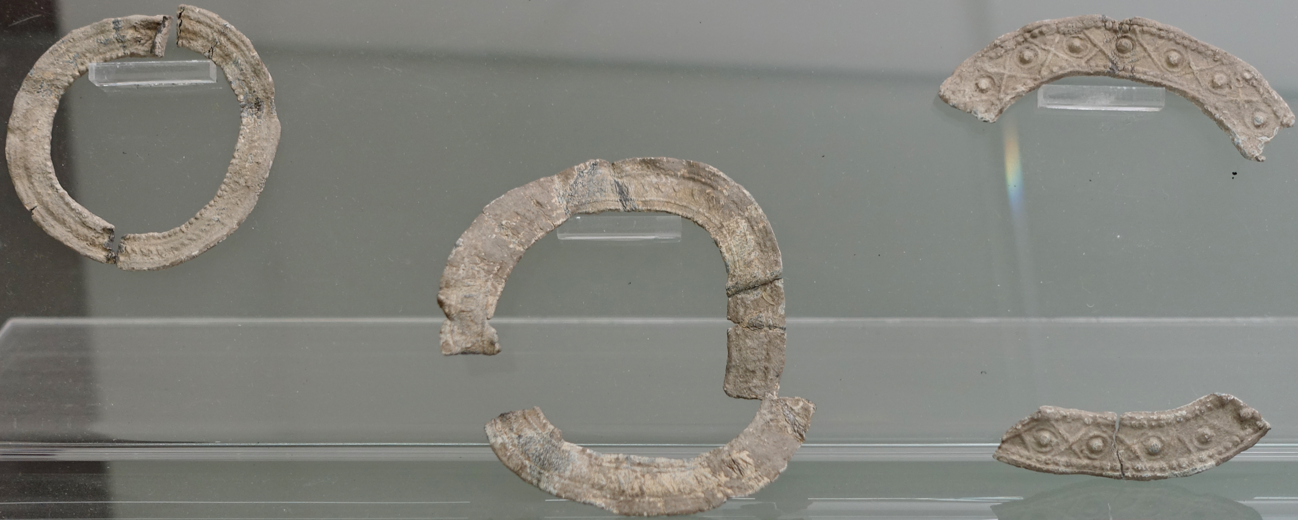 Bleikränze (1. bis 3. Jahrhundert n. Chr.) aus der Ausgrabung von Cuccureddus, ausgestellt im archäologischen Museum von Villasimius, Sardinien, Italien